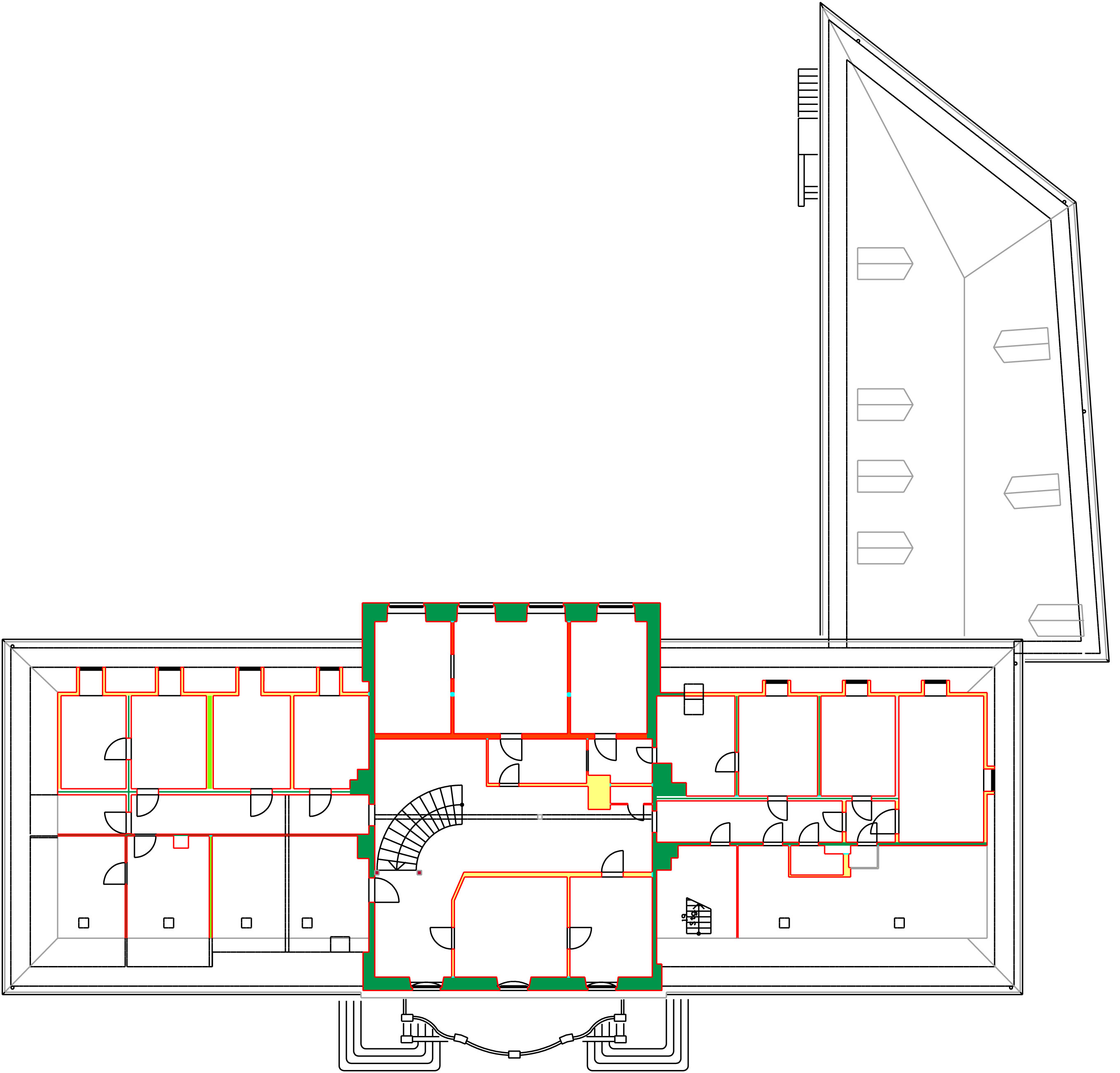 Dachgeschoss Grundriss mit historischen Bauepochen, Schloss Mutzschen, Landkreis Leipzig